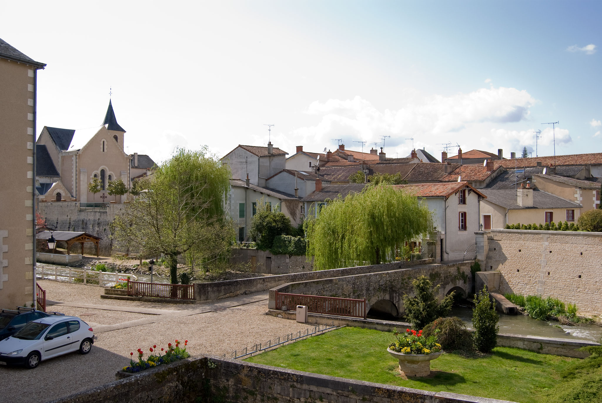 Centre du Chasseneuil-du-Poitou